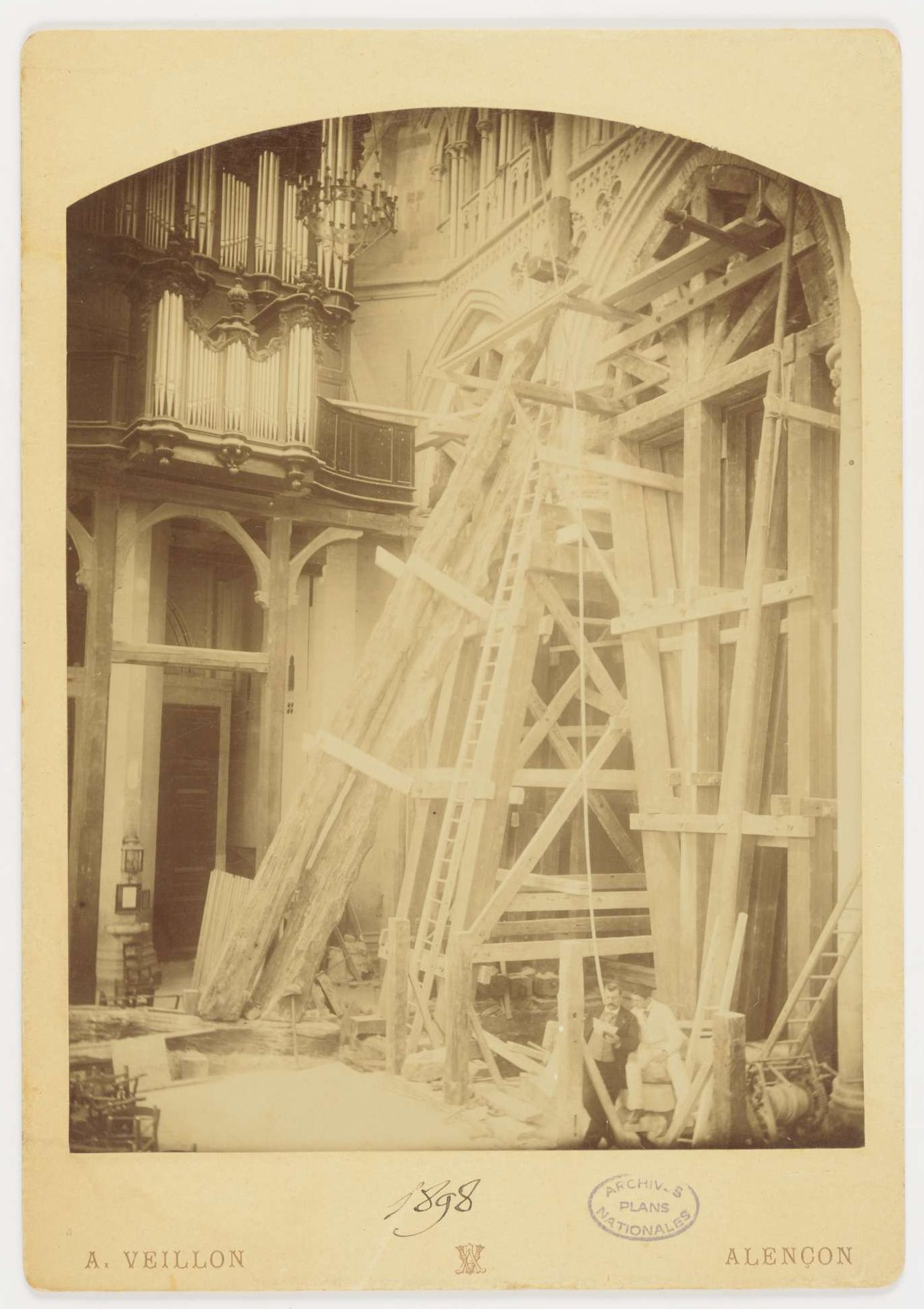 Reconstruction de la nef : vue intérieure en légère plongée en direction du portail (les orgues en arrière-plan, des échafaudages, échelles et étais sur la droite, au premier plan deux hommes lisant un document vêtus de costumes et cravatés). Photographié par A. Veillon, Alençon. Mention manuscrite à l’encre noire au recto : 1898 ; marque du photographe imprimé en marron au recto : A.VEILLON / ALENCON. Échelle : 2 cm / 1 m. Photographie issue des dossiers de travaux de restauration des cathédrales (1802-1912), conservés aux Archives nationales (inventaire et documents numérisés consultables en ligne).